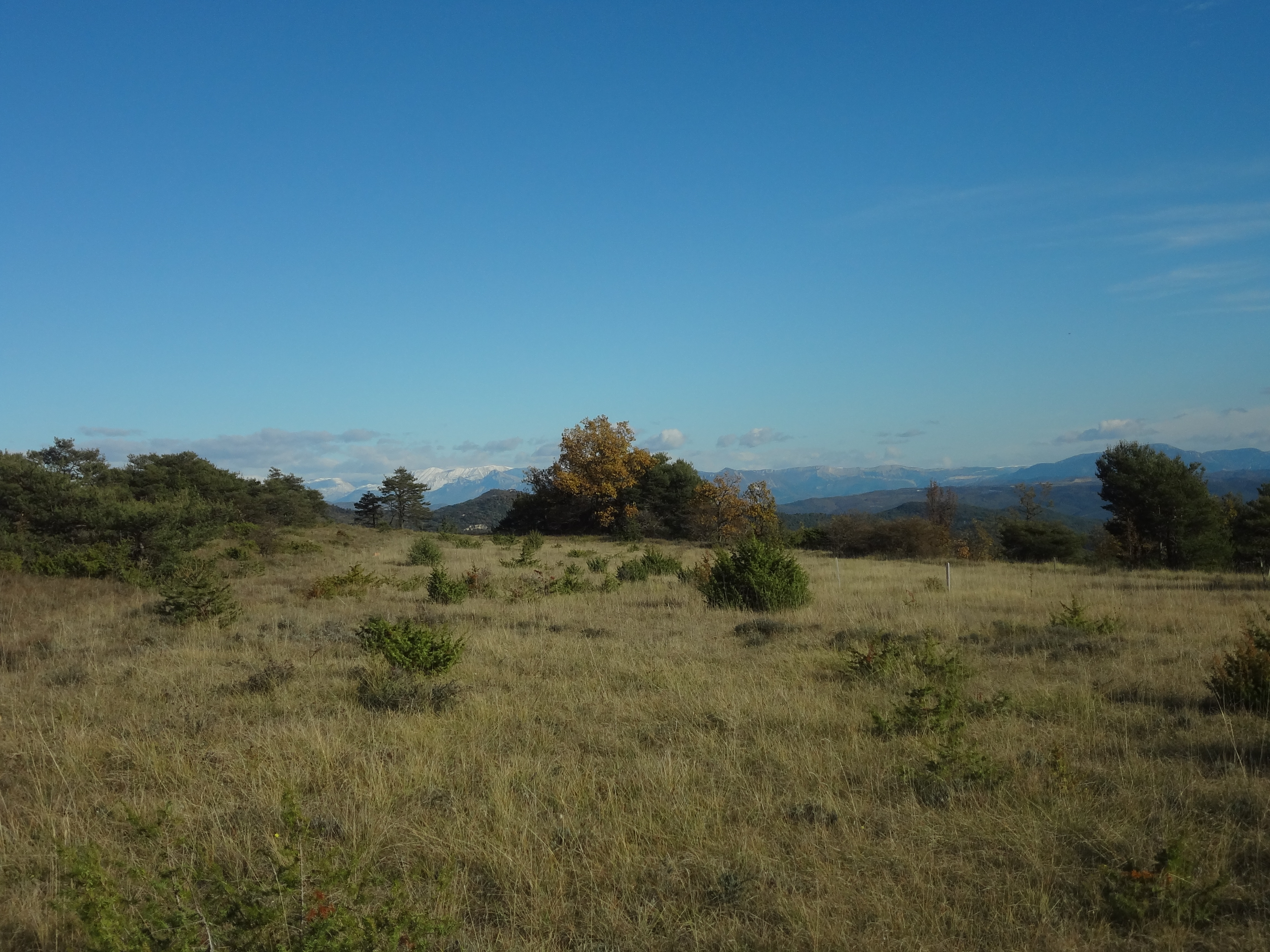 environ 770 m d’altitude